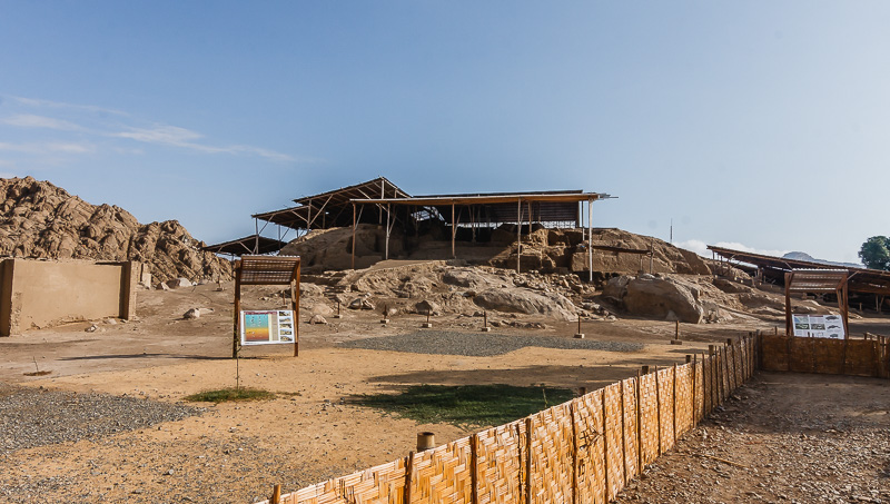 Lambayeque, Perú